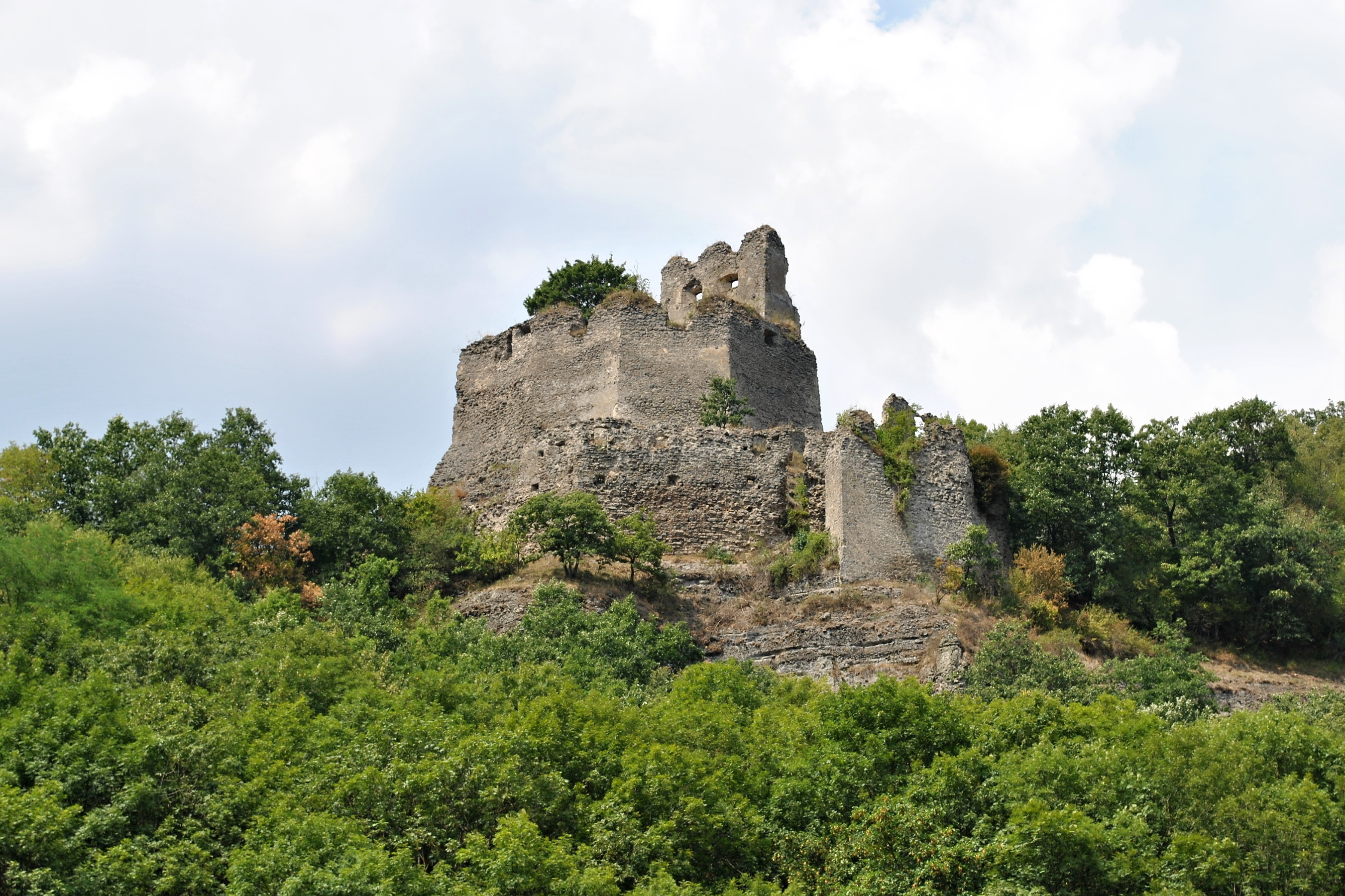 Hrad Čabraď - pohľad od cesty